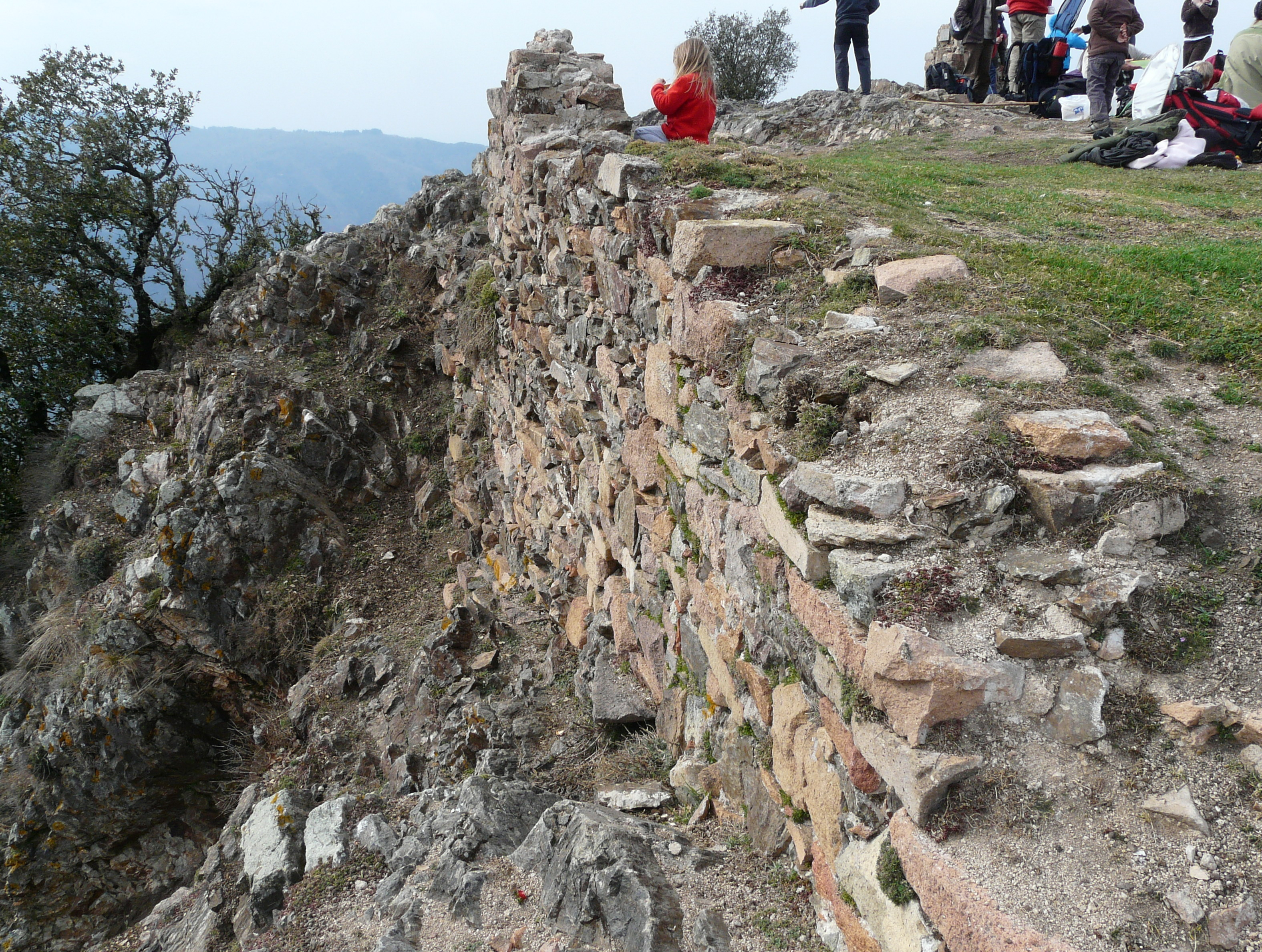 Castell de Solterra (Sant Hilari Sacalm) Object location41° 55′ 23.39″ N, 2° 31′ 58.69″ E